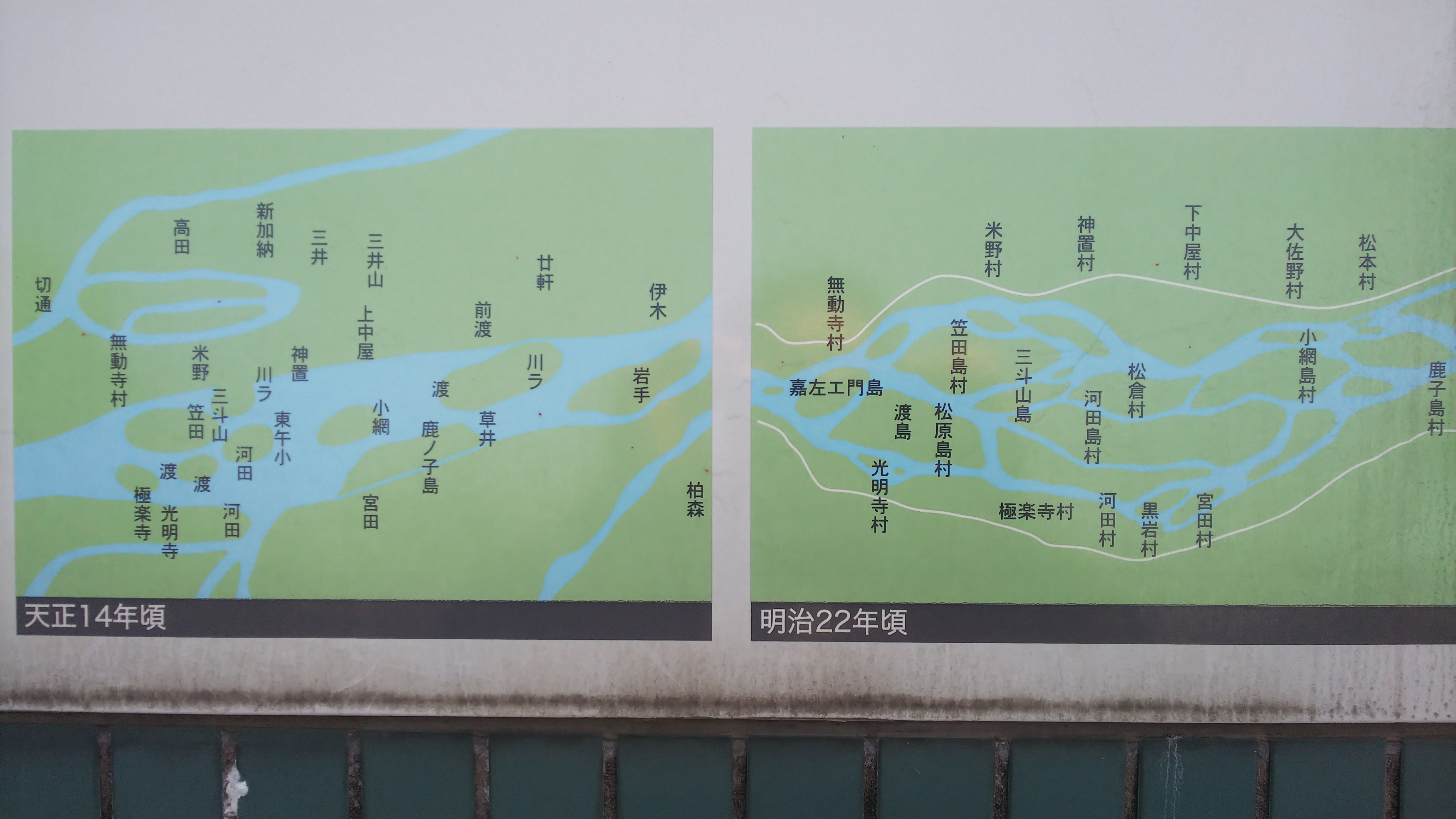 松倉近辺の川筋の変化